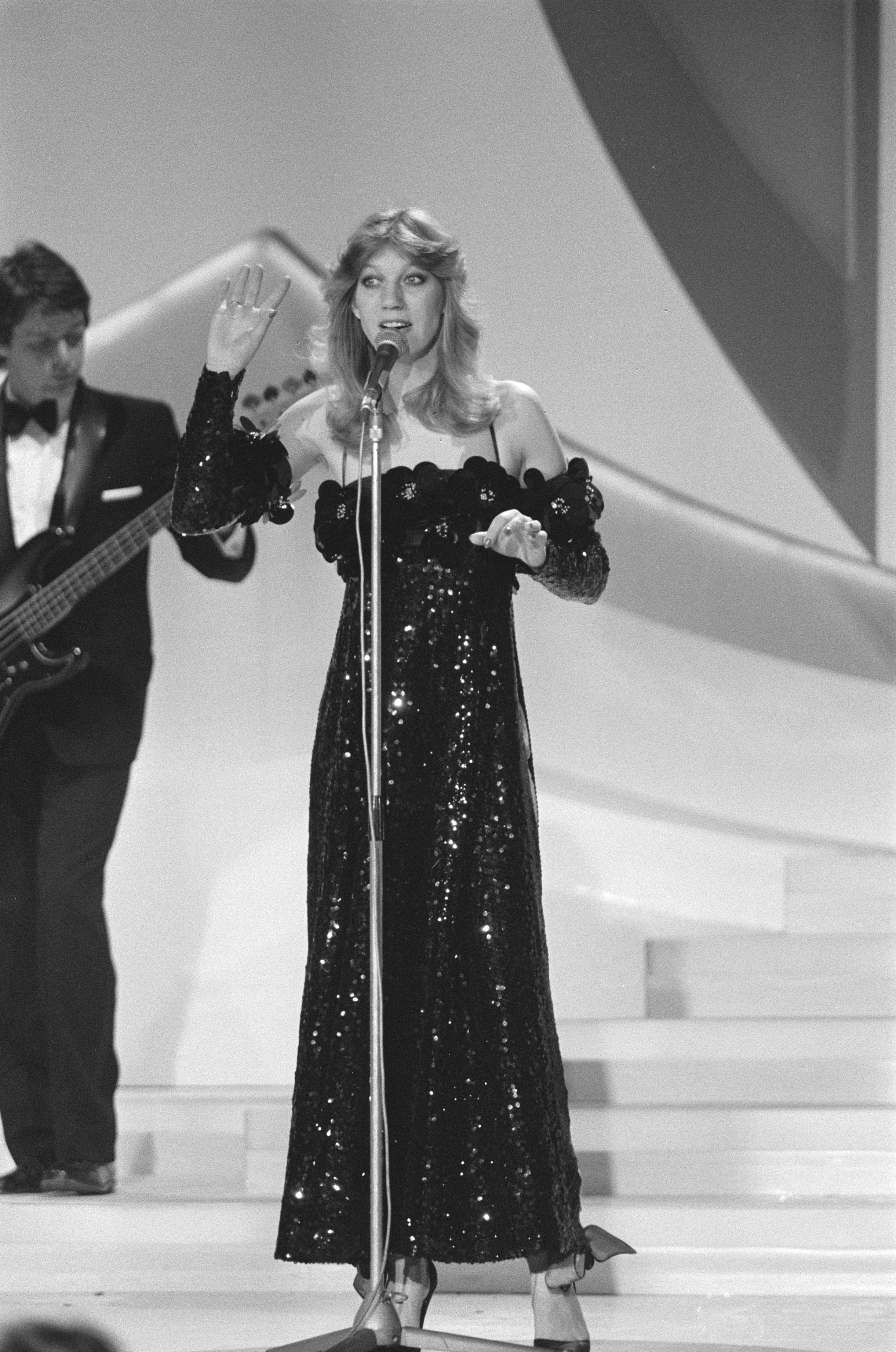 Collectie / Archief : Fotocollectie Anefo Reportage / Serie : [ onbekend ] Beschrijving : Deelnemers Eurovisie Song Festival in Den Haag ; Maggie Mac Neal (Nederland) Datum : 22 april 1980 Locatie : Den Haag, Nederland Trefwoorden : deelnemers, songfestivals Instellingsnaam : Eurovisie Song Festival Fotograaf : Dijk, Hans van / Anefo Auteursrechthebbende : Nationaal Archief Materiaalsoort : Negatief (zwart/wit) Nummer archiefinventaris : bekijk toegang 2.24.01.05 Bestanddeelnummer : 930-7861 Reacties Geplaatst door Maaike op 28 augustus 2012 - 15:42. Maggie MacNeal in een creatie van couturier / modeontwerper Frank Govers behaalde de 5e plaats met haar liedje 'Amsterdam' locatie: Congresgebouw te Den Haag